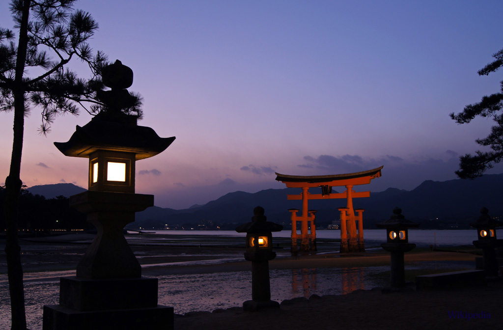 ライトアップされる厳島神社の大鳥居